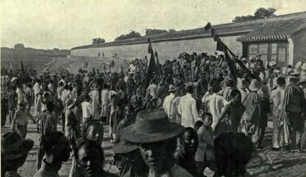 Partidarios de la monarquía junto al Templo del Cielo, Pekín, 1917.